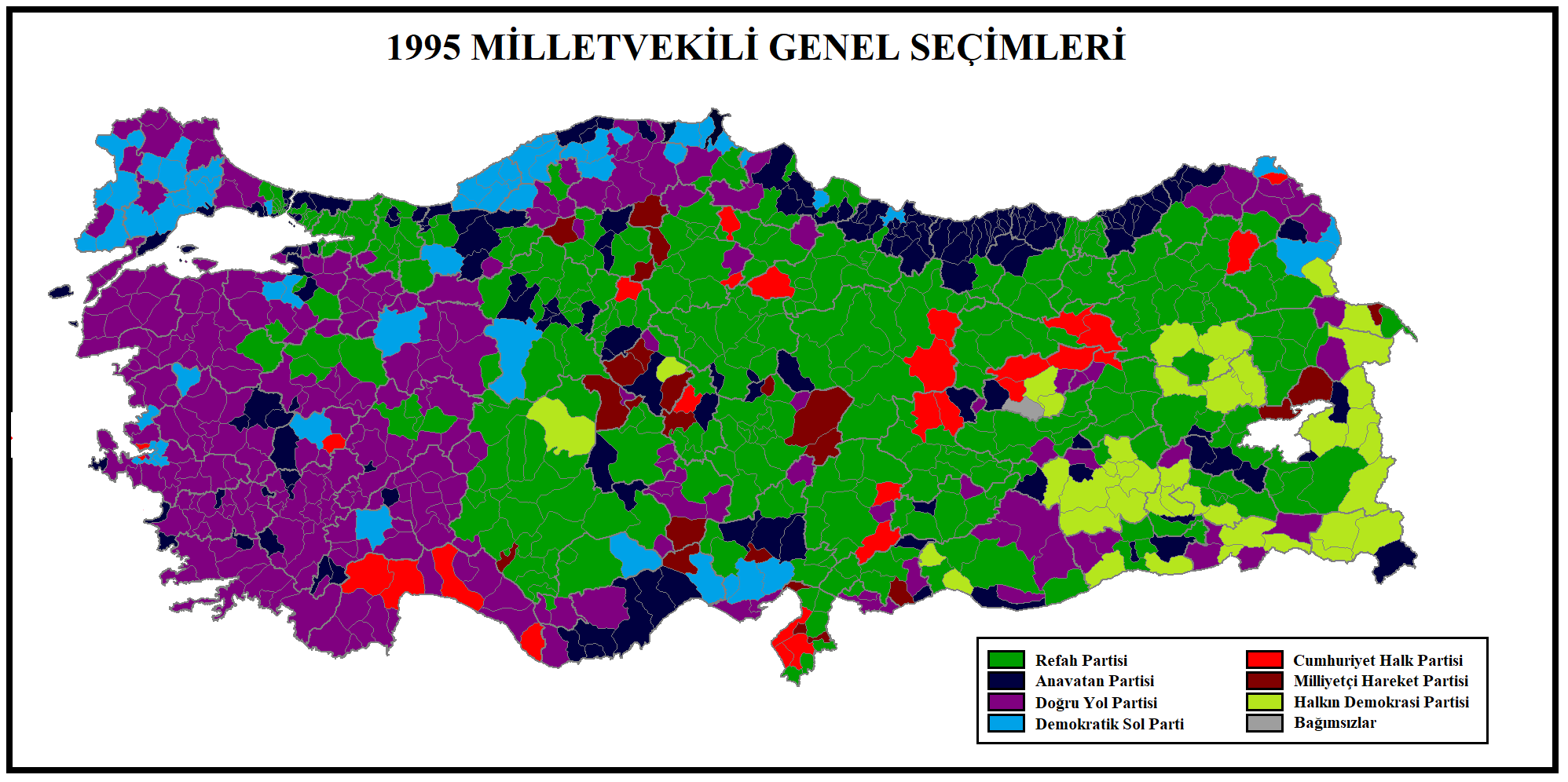 1995 genel seçimleri sonucunun Türkiye ilçeler haritasında gösterimi.